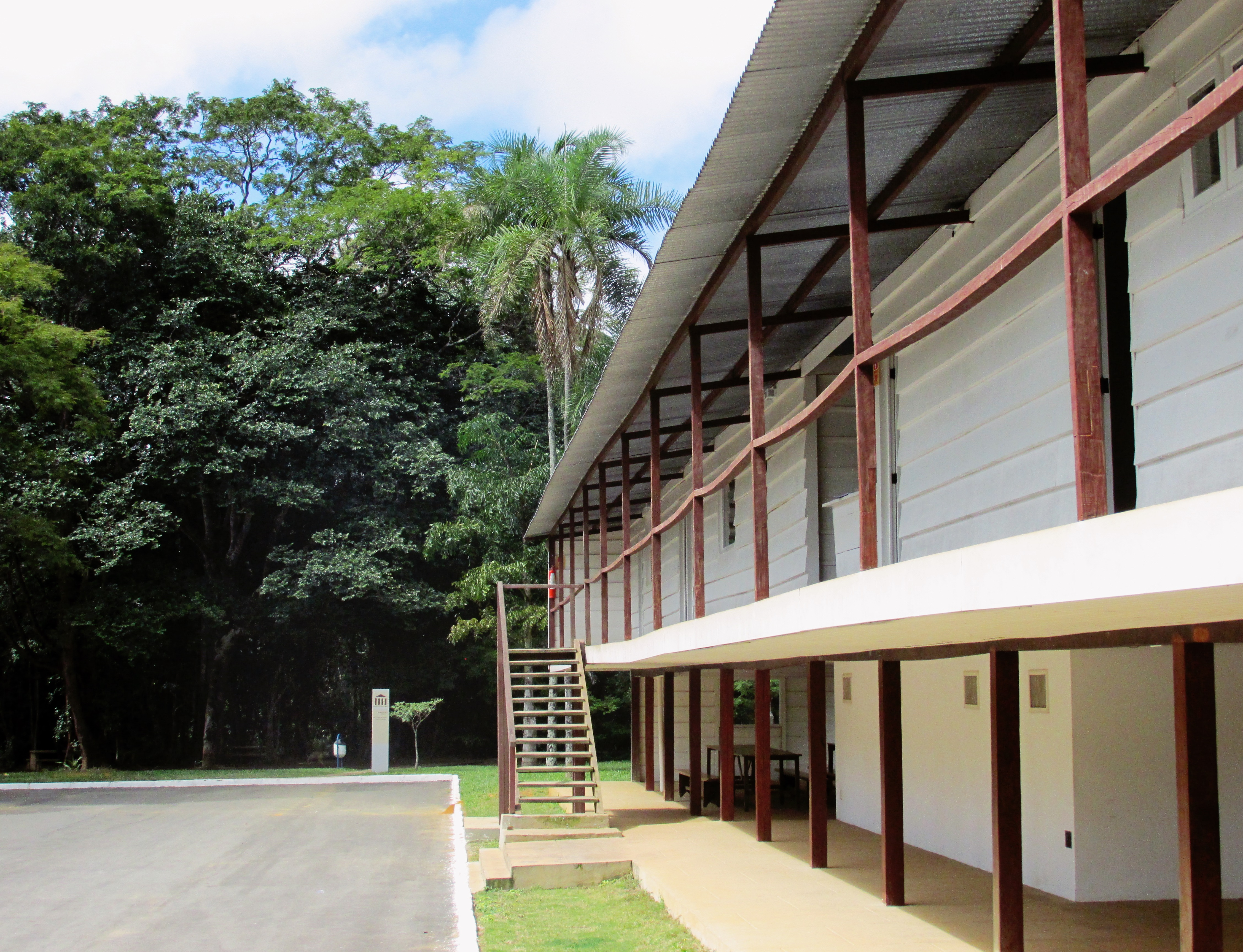 Projeto elaborado por Oscar Niemeyer, em 1956, para servir de residência oficial do presidente Juscelino Kubitschek, durante a construção da nova capital, a cidade de Brasília.